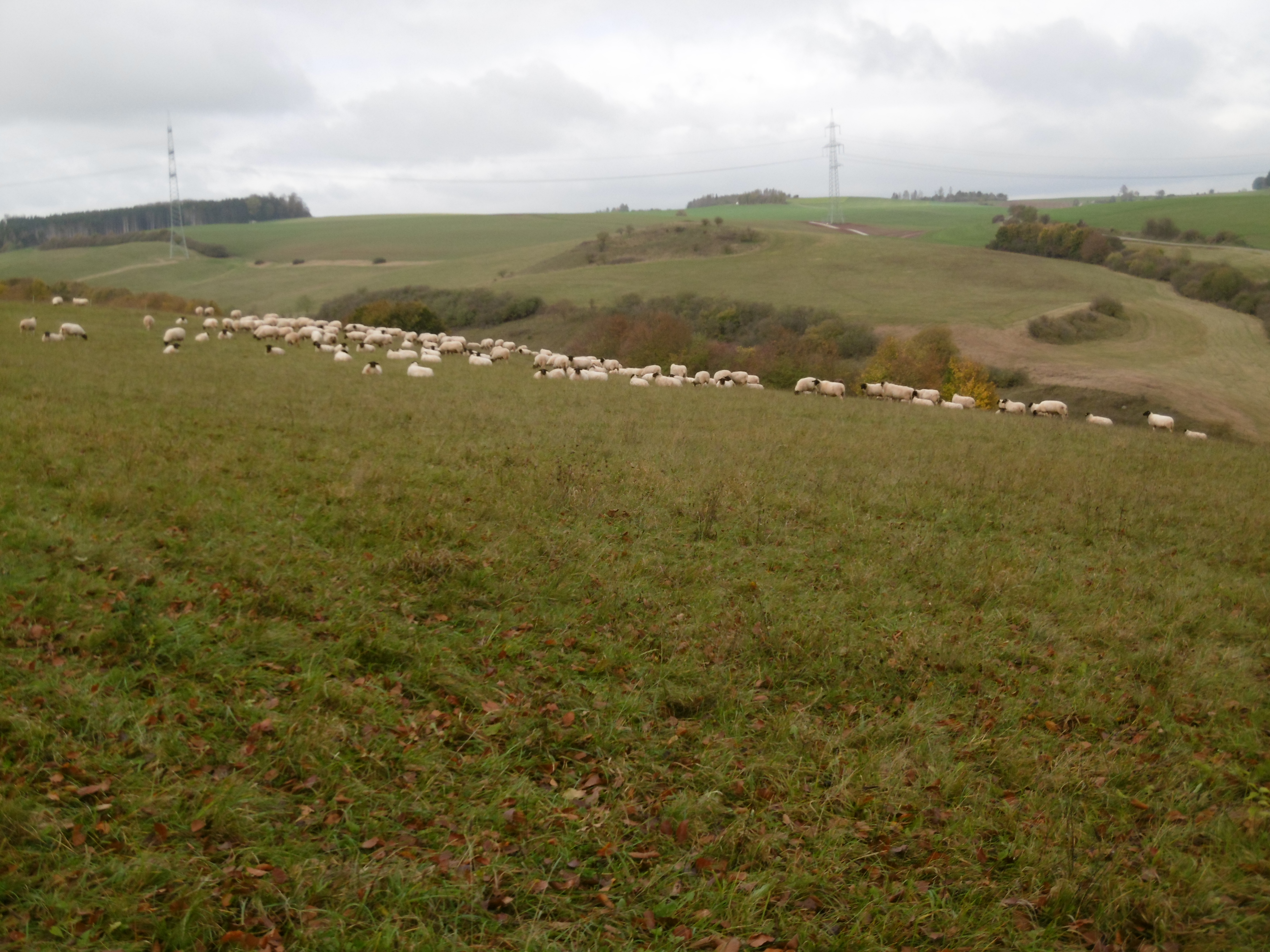 Naturschutzgebiet Glockengrund mit Schafherde vom südlichen NSG-Rand am Glockenrücken Richtung Nordwest, im Hintergrund LSG Rotes Land.